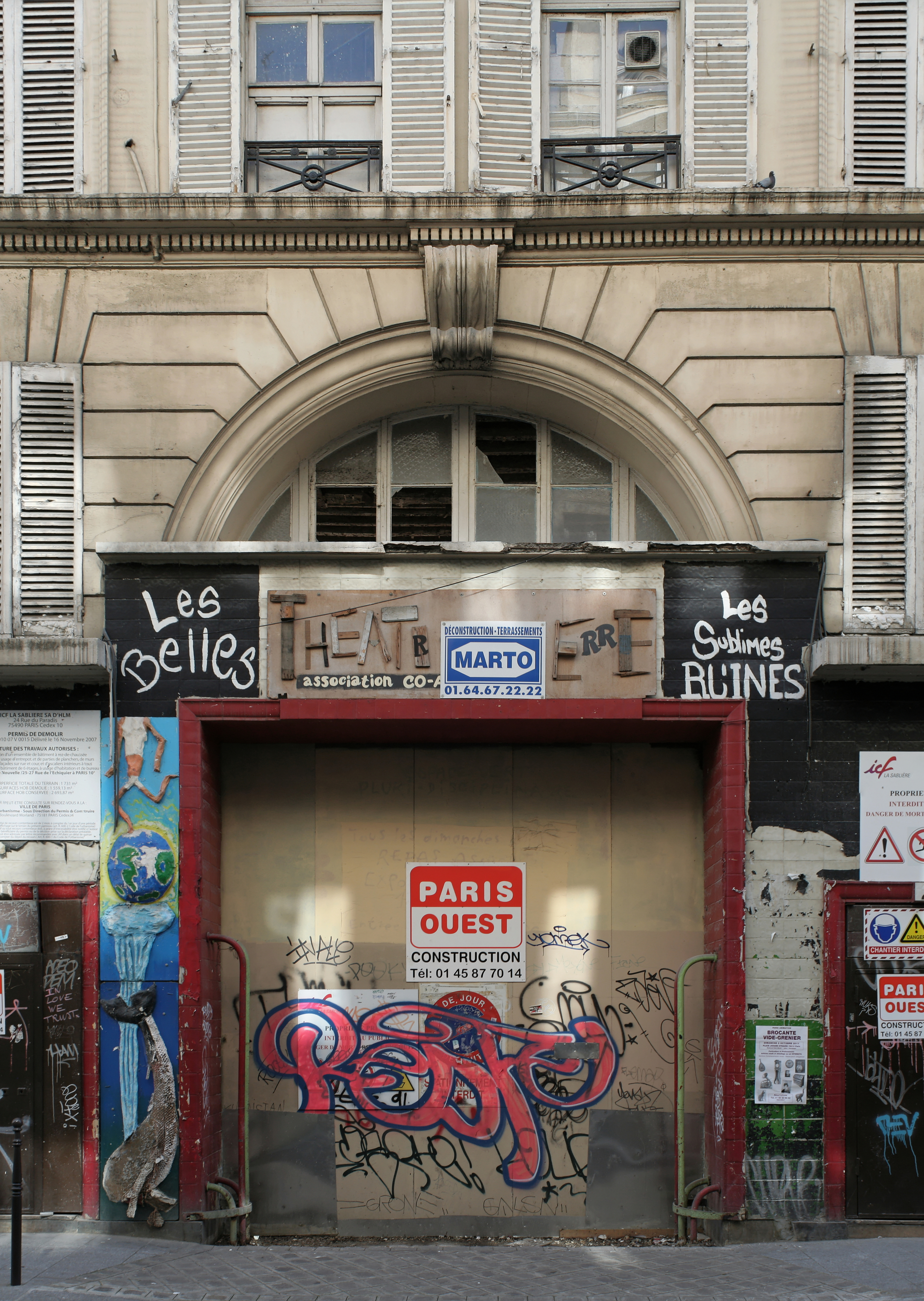 Ancien emplacement du Théâtre de Verre, 21-29 rue de l'Échiquier, Paris.